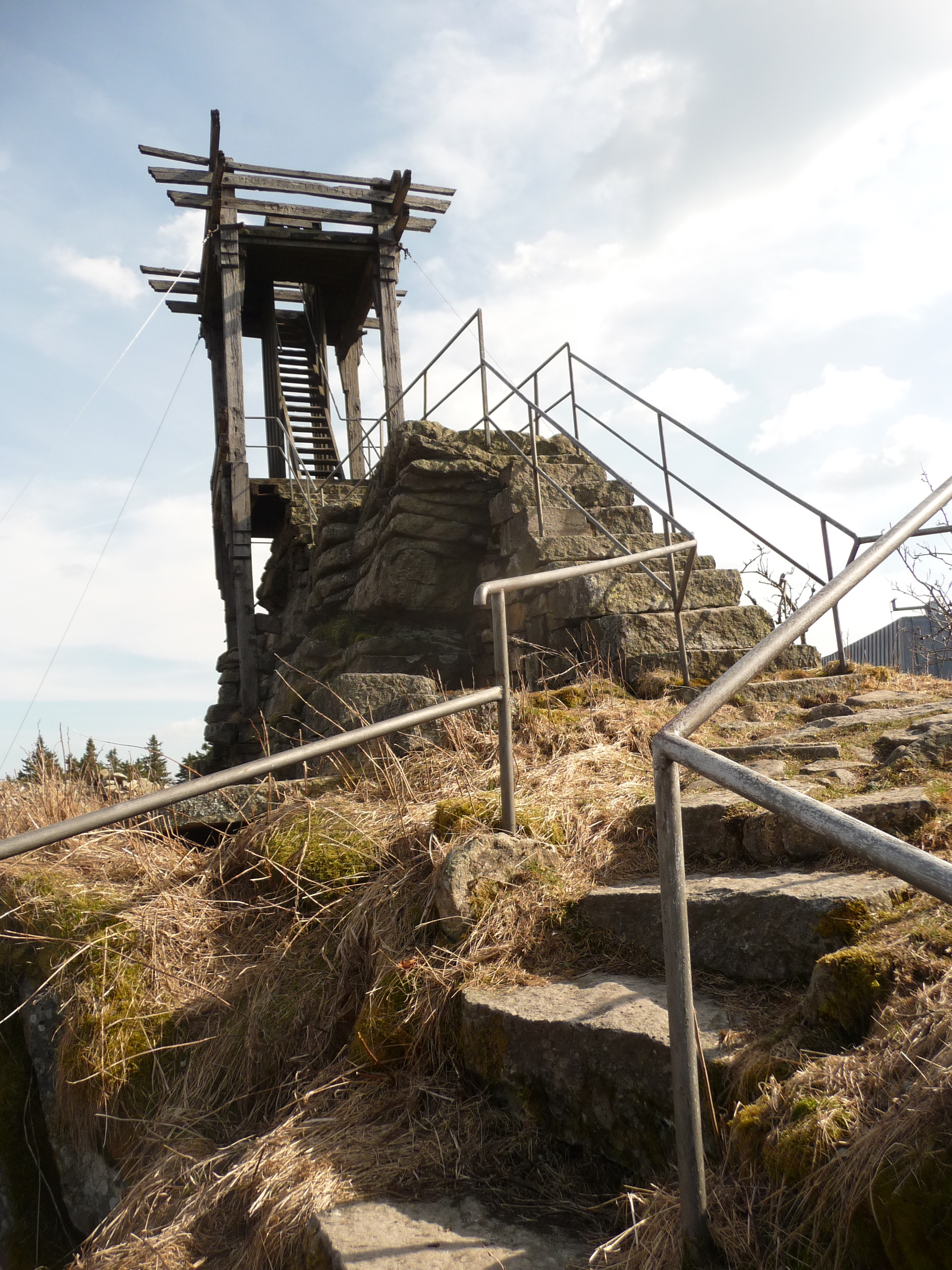 Backöfele - Aussichtsplattform auf dem Schneeberg, spätmittelalterlicher Wartturm